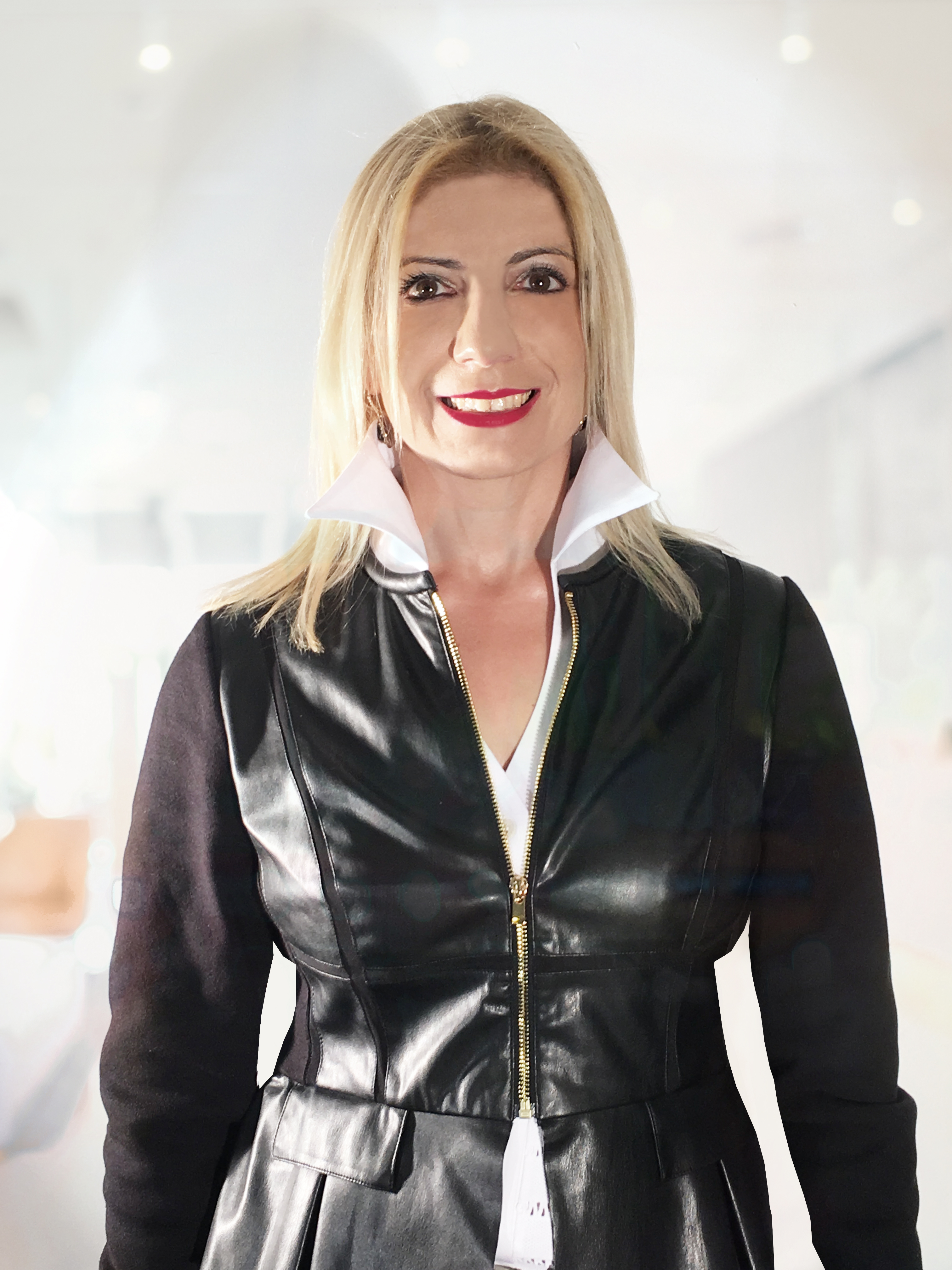 Michal Tamir